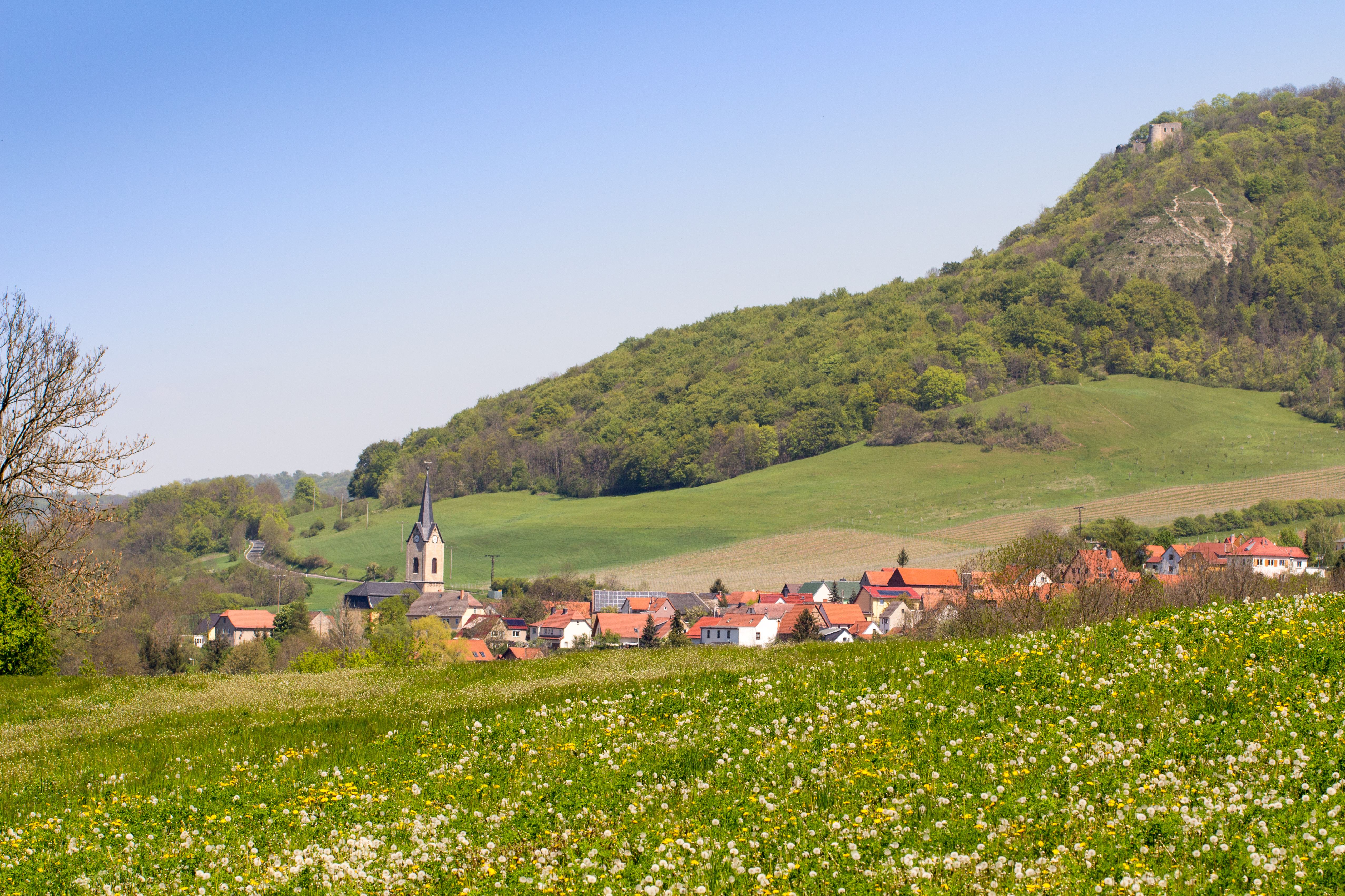 Blick über den Jenaer Ortsteil Kunitz (Vordergrund) zur Ruine der Kunitzburg (auch Burg Gleißberg genannt, oben rechts) im Naturschutzgebiet „Hufeisen-Jenzig“ (hier: Waldbereich)